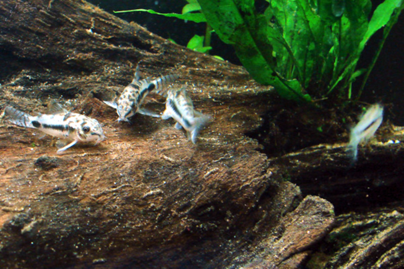 Four Corydoras Habrosus